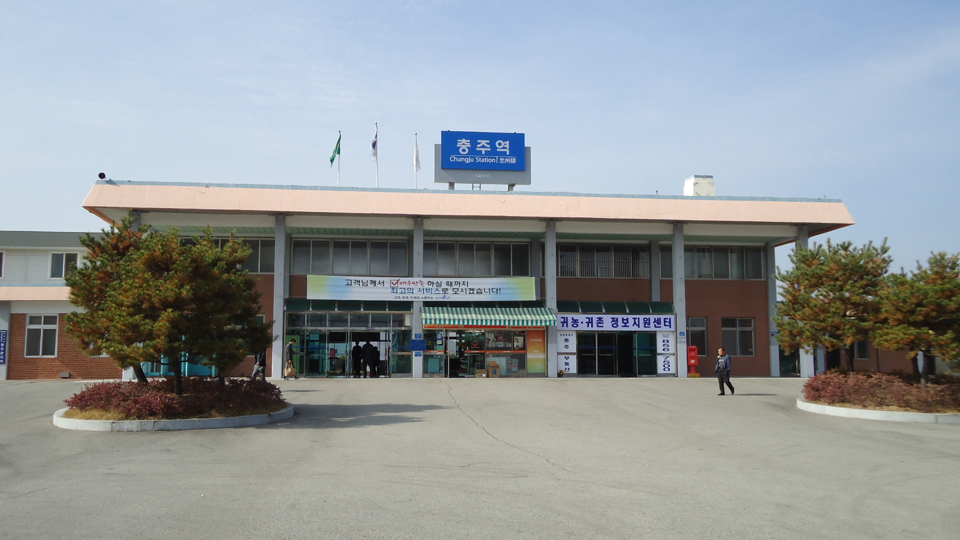 충주역 전경